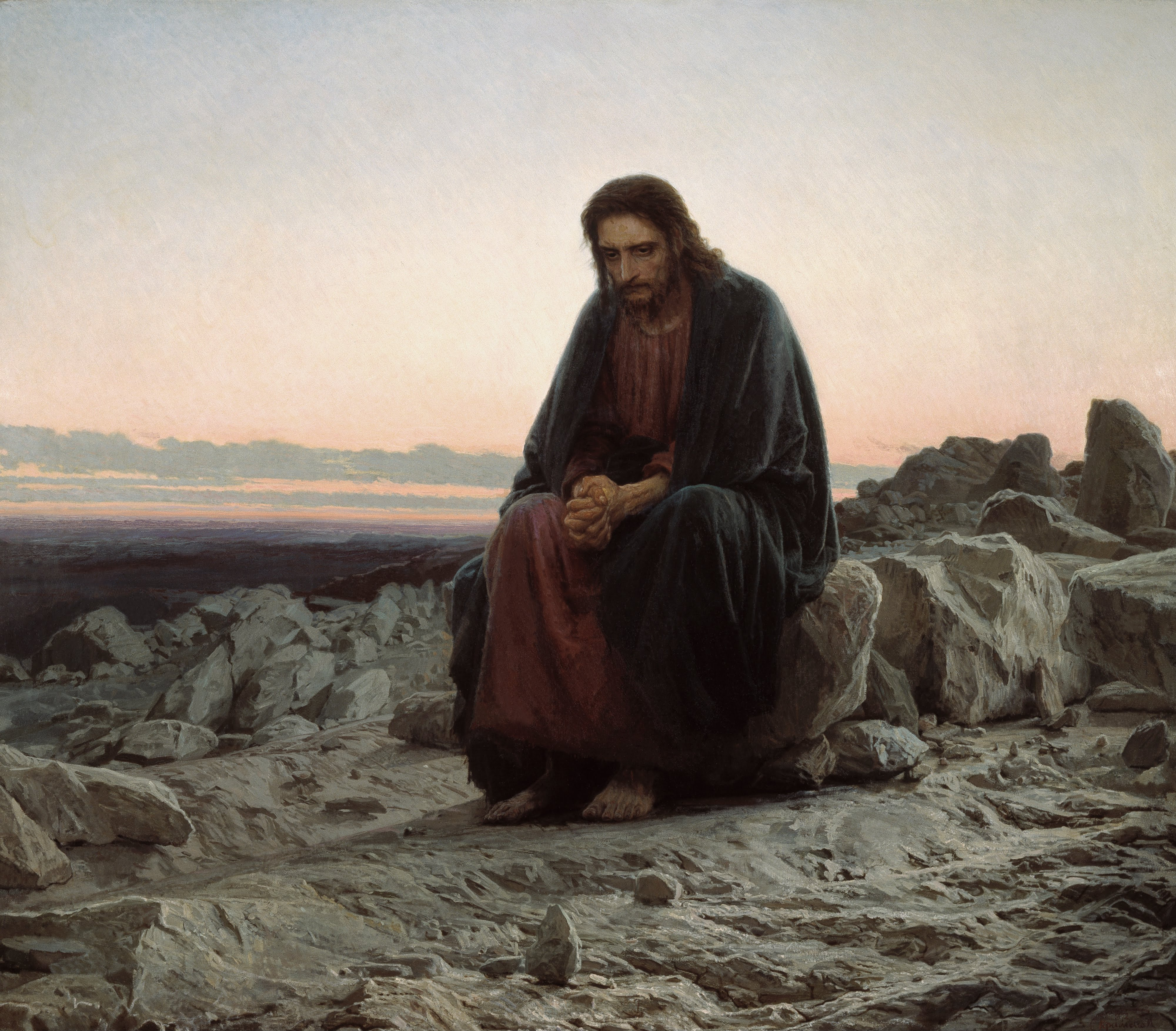 Voir : Le Christ dans le désert See : Christ in the Desert